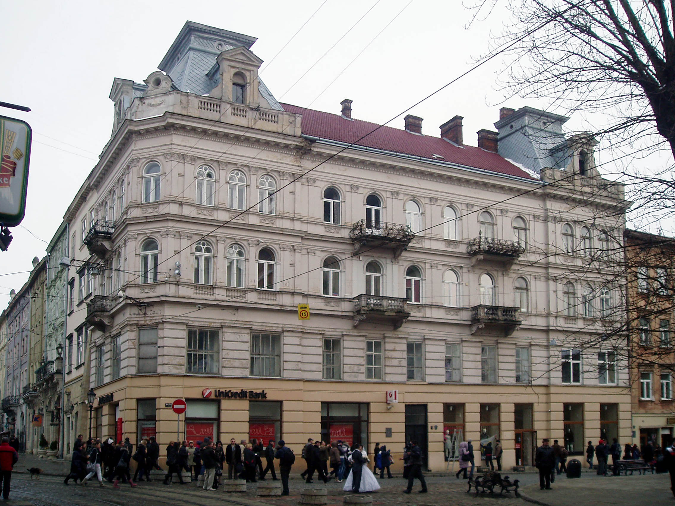 Будинок на розі площі Ринок (№ 22) і вулиці Галицької (№1) у Львові. Архітектор Міхал Фехтер.